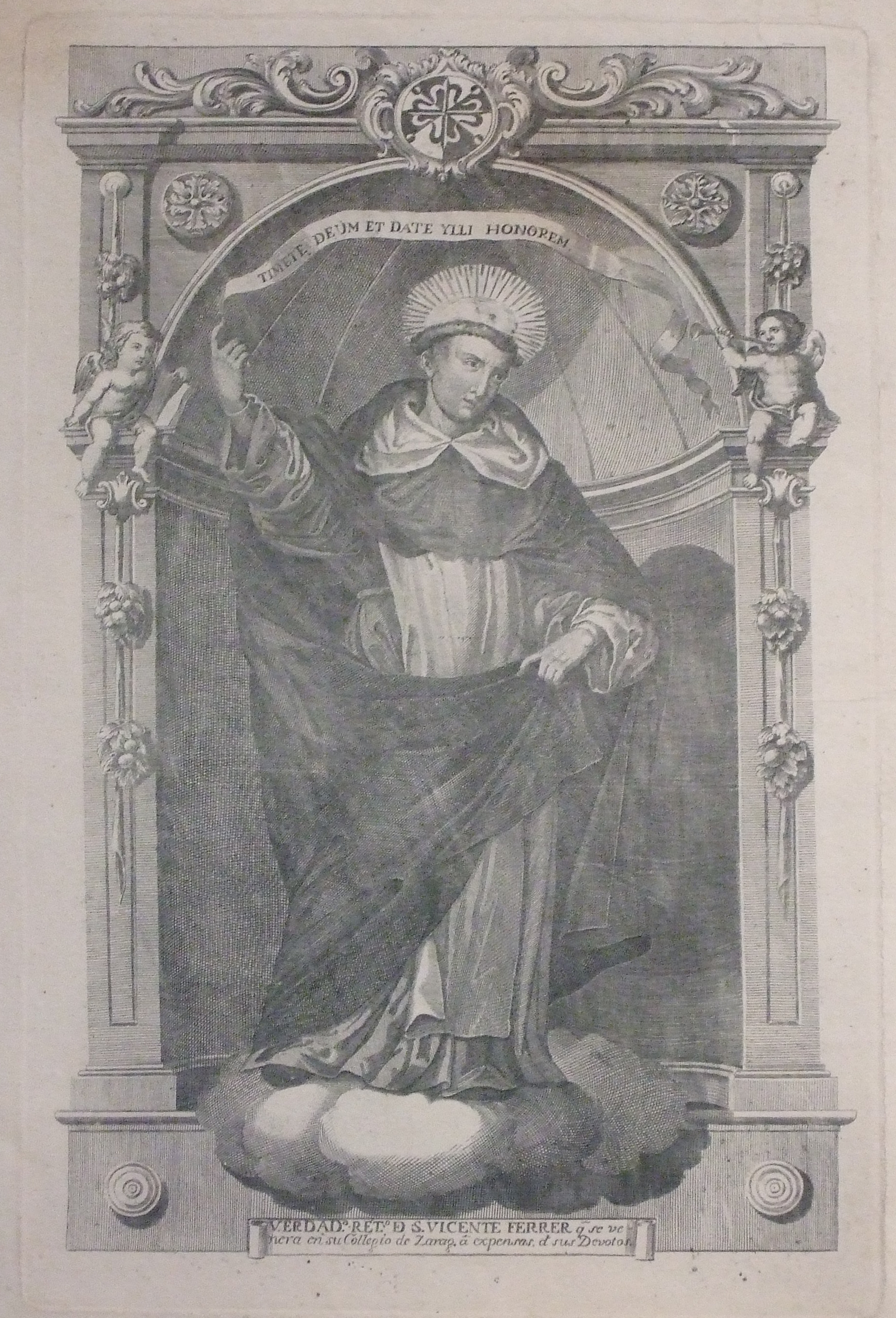 San Vicente Ferrer (s. XIX)Autor anónimoMuseo de Zaragoza